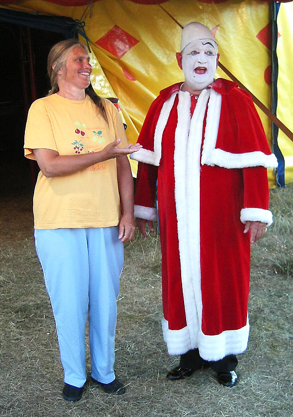 Cirkuspræsten Inge-Lise Wagner sammen med cirkusdirektør og klovn Søren Arli (Rågeleje, Danmark, 16-07-2006)